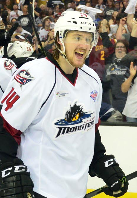 Photo: John Saraya